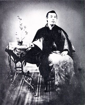 新島襄の弟、双六